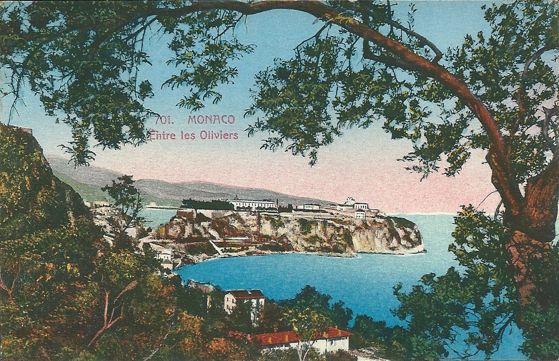 Monaco - Carte postale ancienne - début XXe siècle